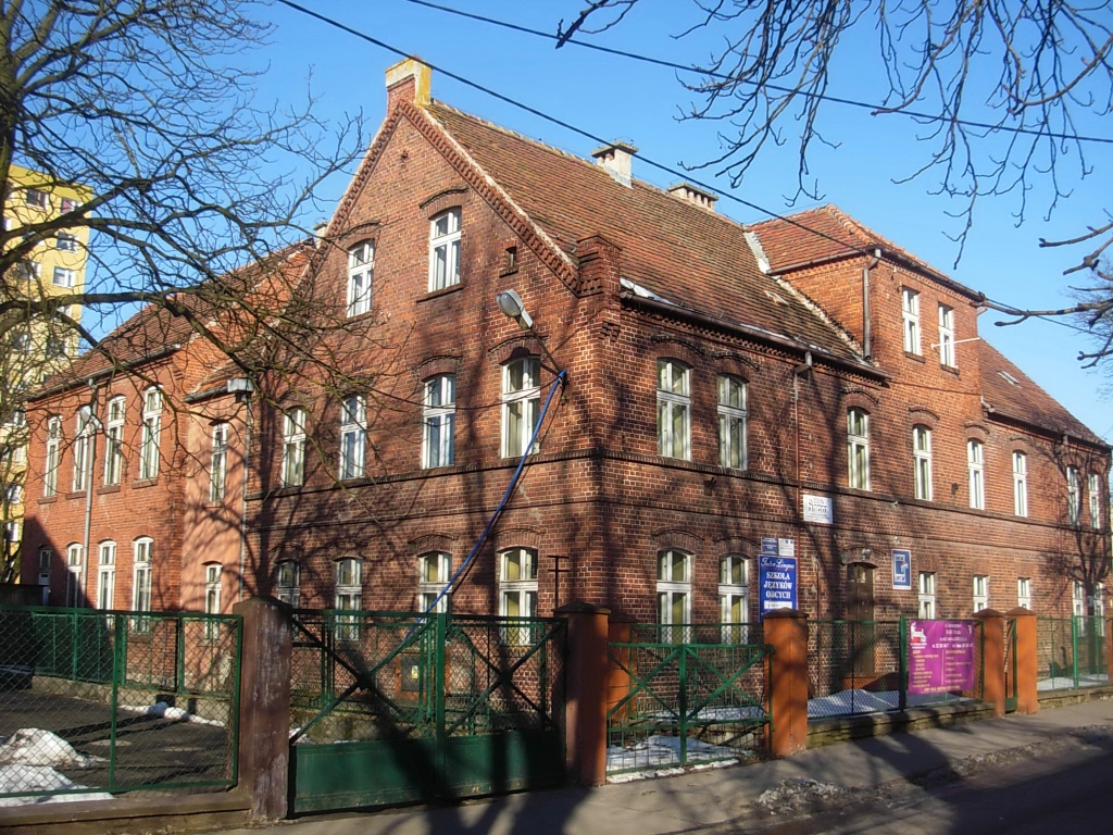 Budynek dawnej szkoły ludowej przy ul. Karpackiej na osiedlu Wzgórze Wolności w Bydgoszczy